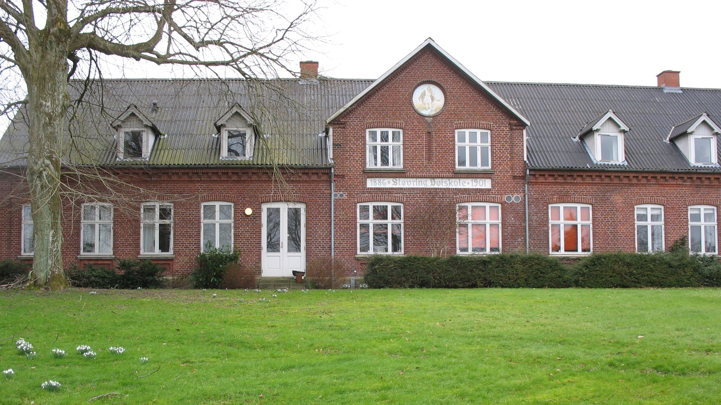 Støvring Højskole - fra parken